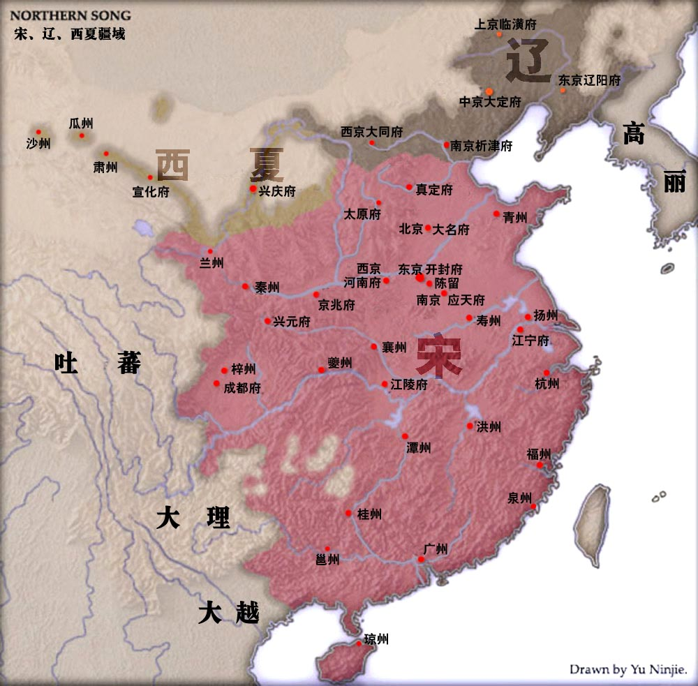 宋、辽、西夏疆域。Bân-lâm-gú: Sòng, Liâu, Se-hā kiong-hi̍k. 宋、遼、西夏疆域。